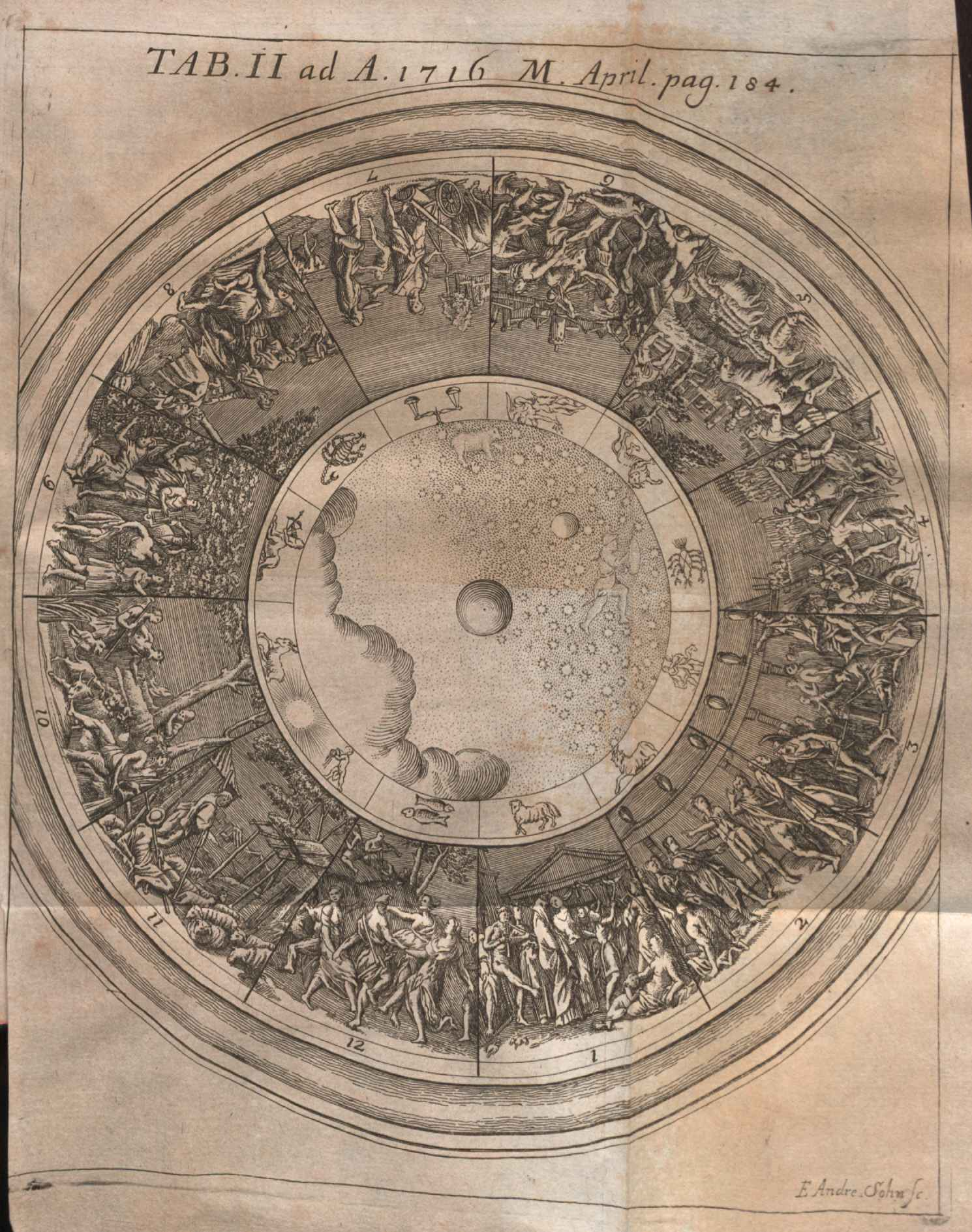 Illustration